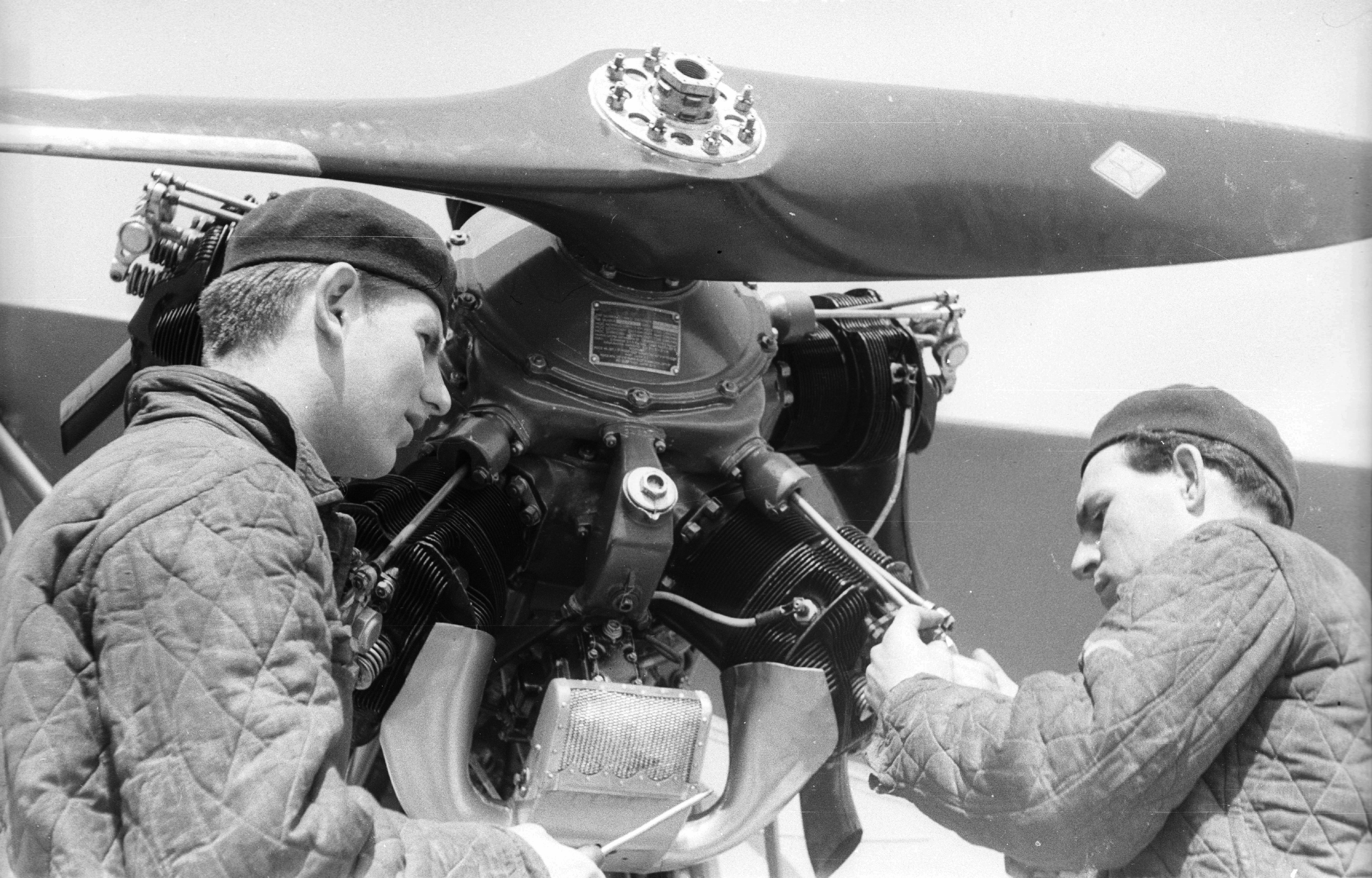 Polikarpov Po-2 típusú repülőgép. Location: Hungary, Budapest II., Hármashatárhegy Airport Tags: airplane, Soviet brand, radial engine, Budapest Title: Polikarpov Po-2 típusú repülőgép.